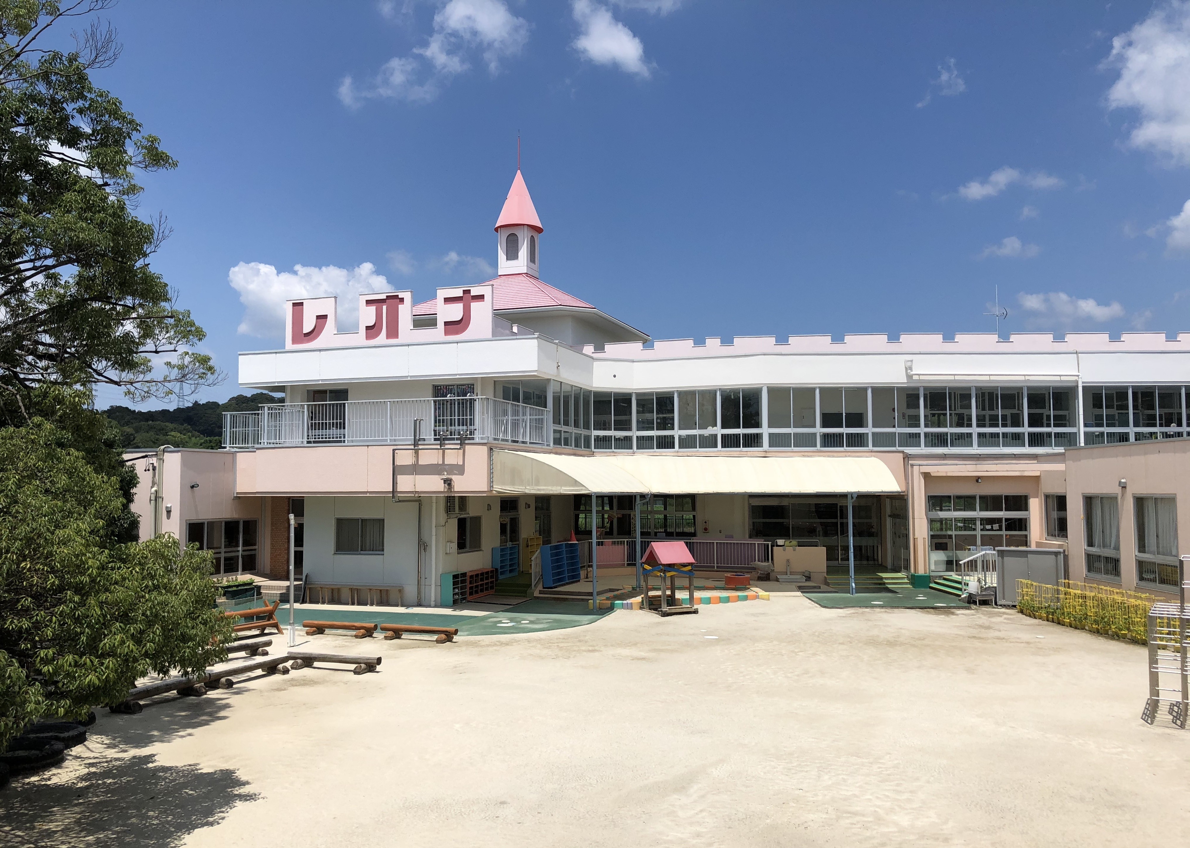 レオナ第二幼稚園（岡崎市西阿知和町）